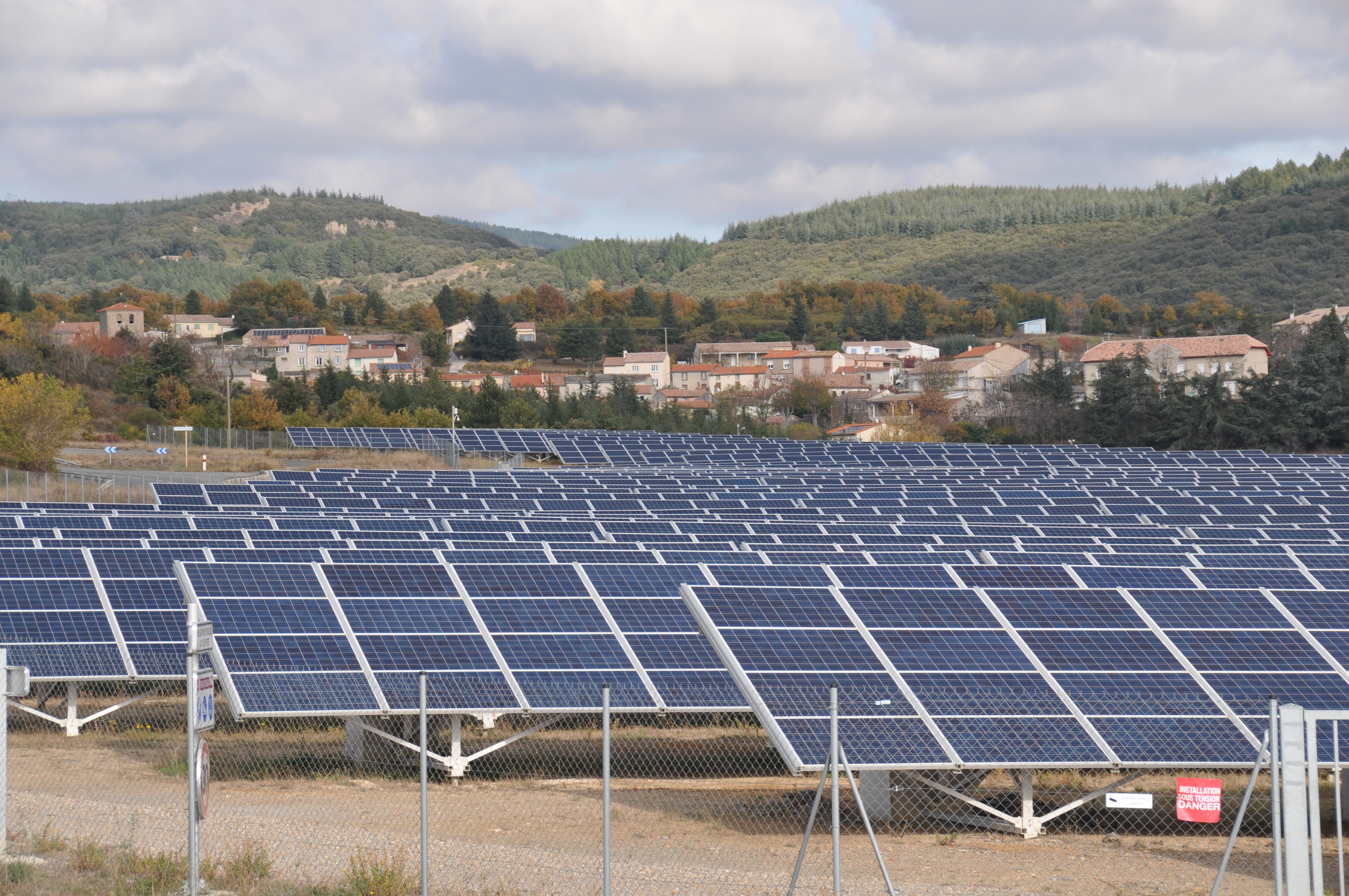 Panneaux de la centrale solaire du puits Castan